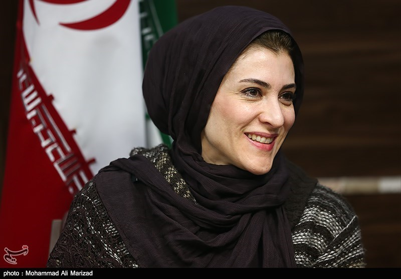 ویشکا آسایش